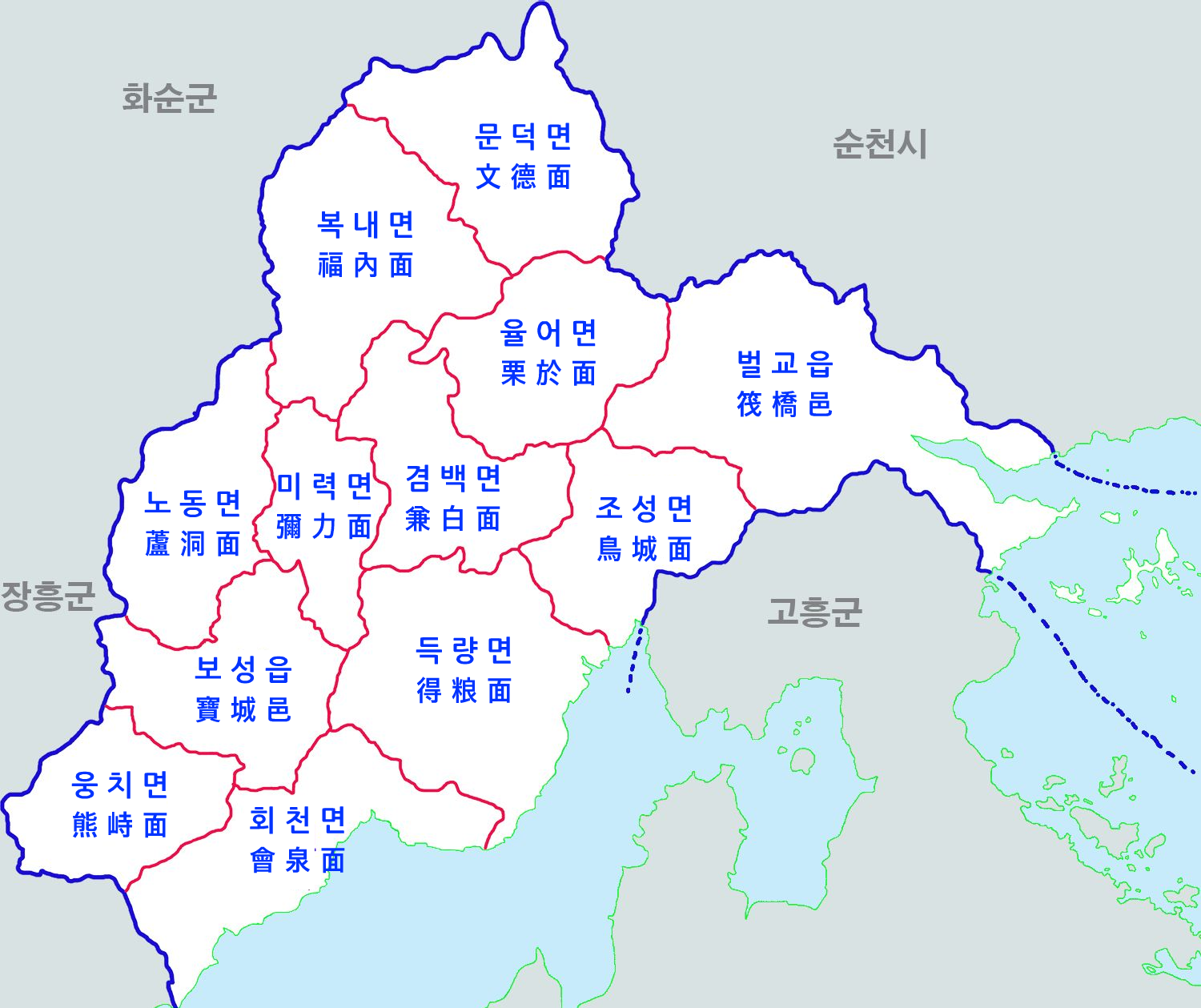 보성군 행정구역